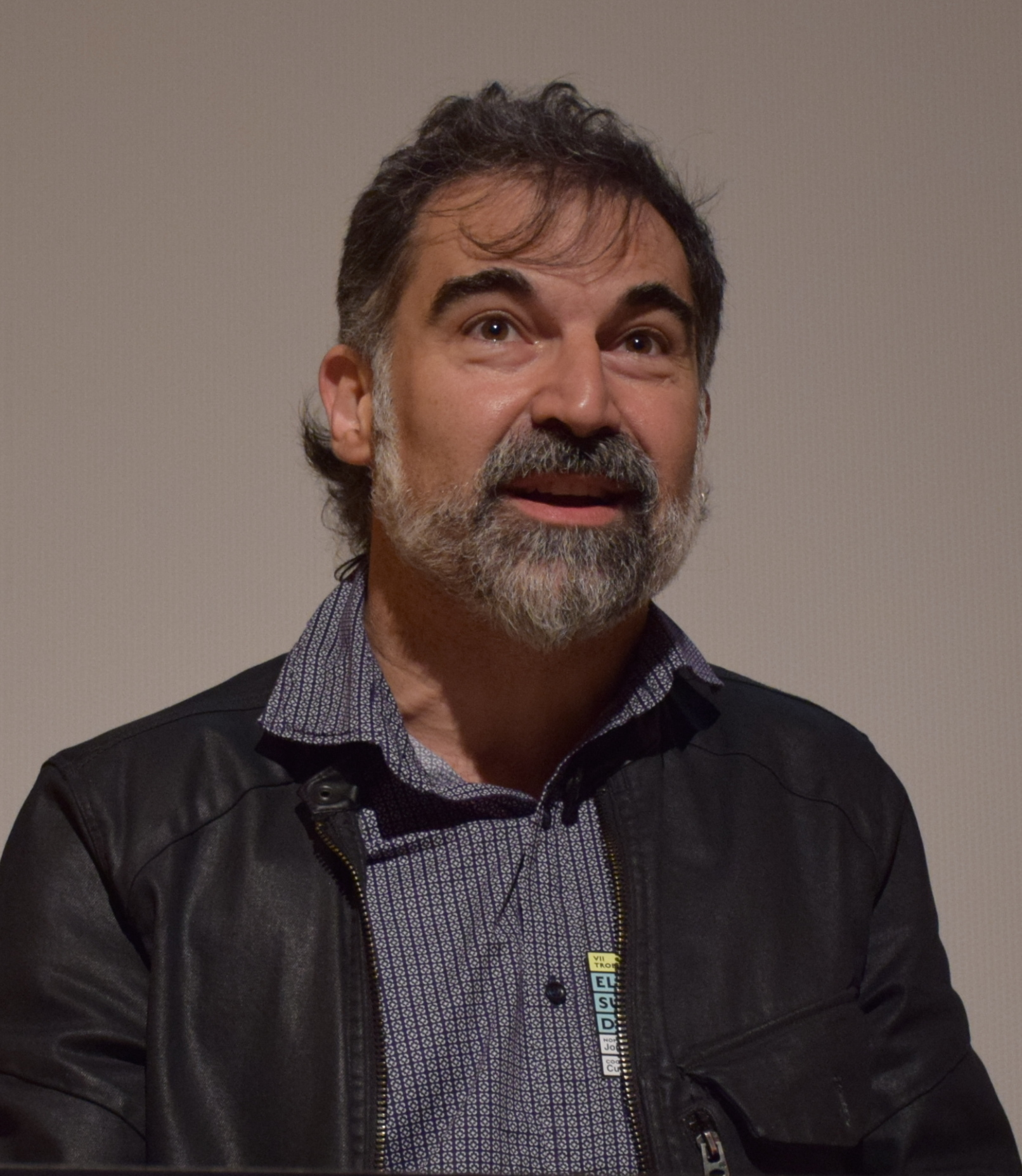 COMPARTIM ÒMNIUM és el títol de la VII Trobada Nacional que vam fer el passat 9 d'abril de 2016 al Campus de Comunicació de la Universitat Pompeu Fabra.